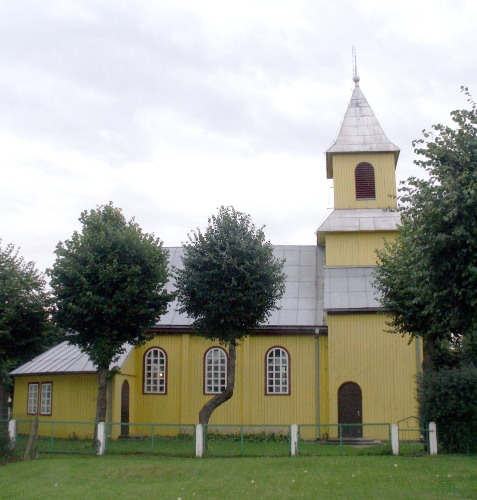 Kužių Švč. Mergelės Marijos Gimimo bažnyčia